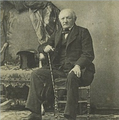 Барон Отто Дмитриевич Шеппинг (1790-1874)